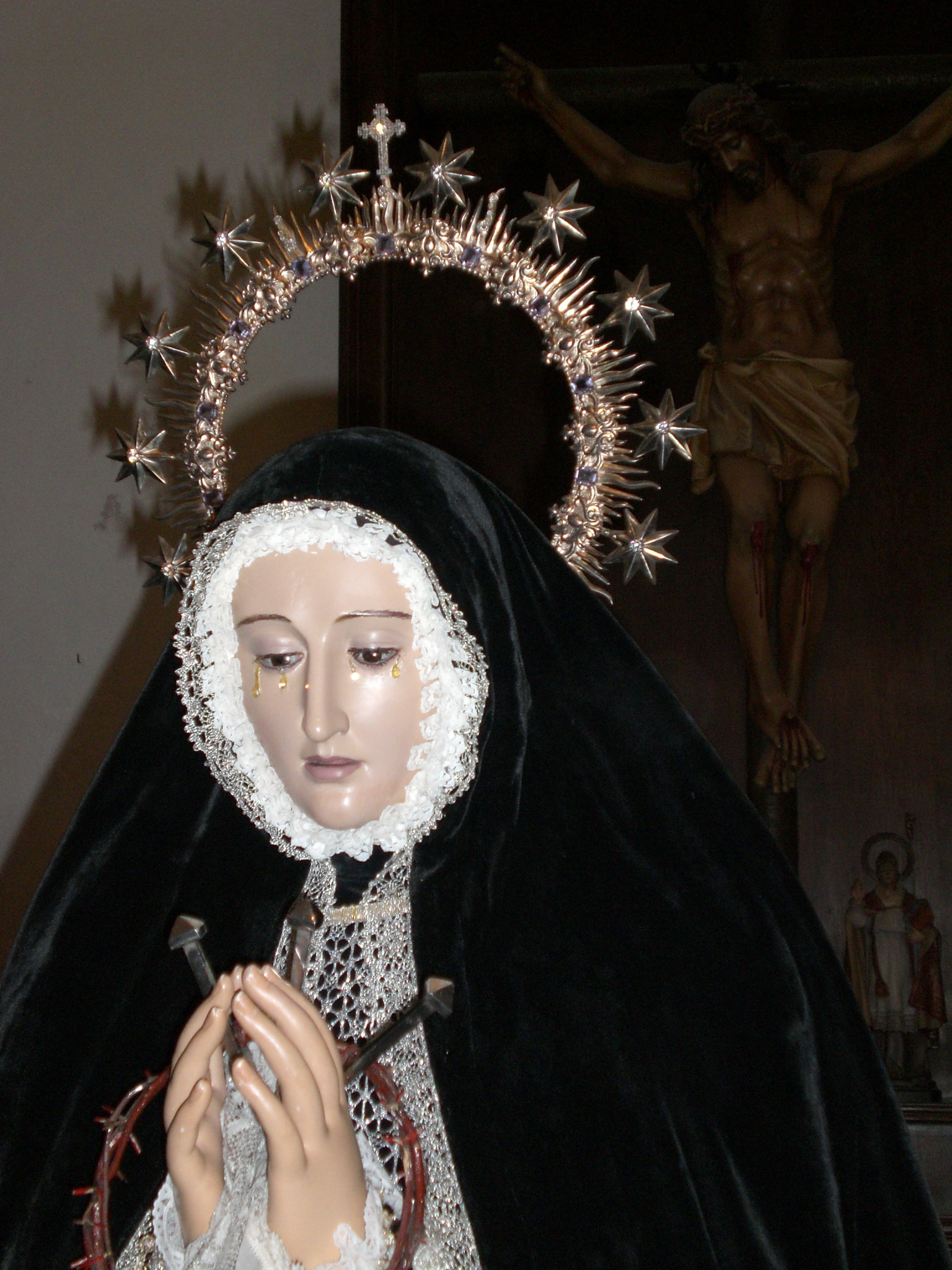 Nuestra Señora de la Soledad en la Sacristia